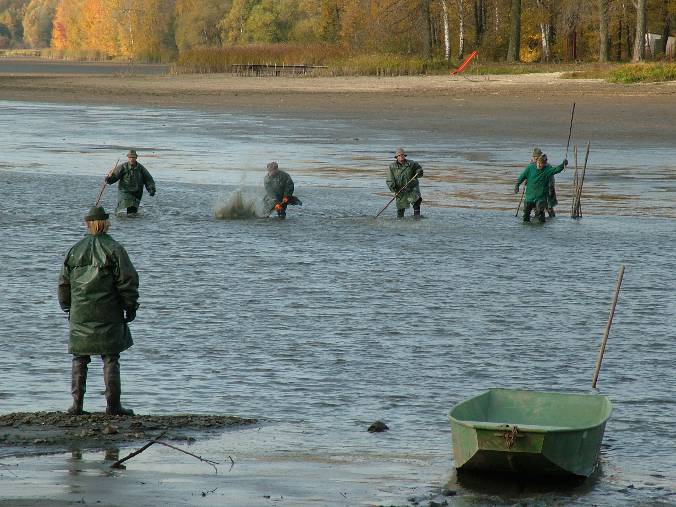 Rybolov Velkého rybníka, Jesenice